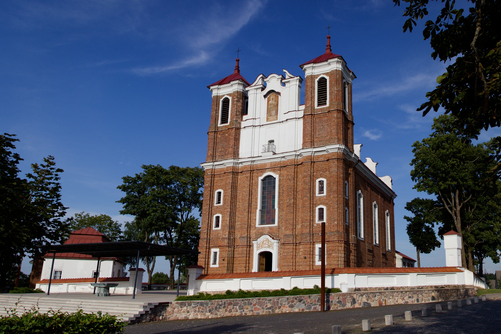 Šiluvos Švč. Mergelės Marijos Gimimo bazilika 2013 m. (Raseinių rajonas)